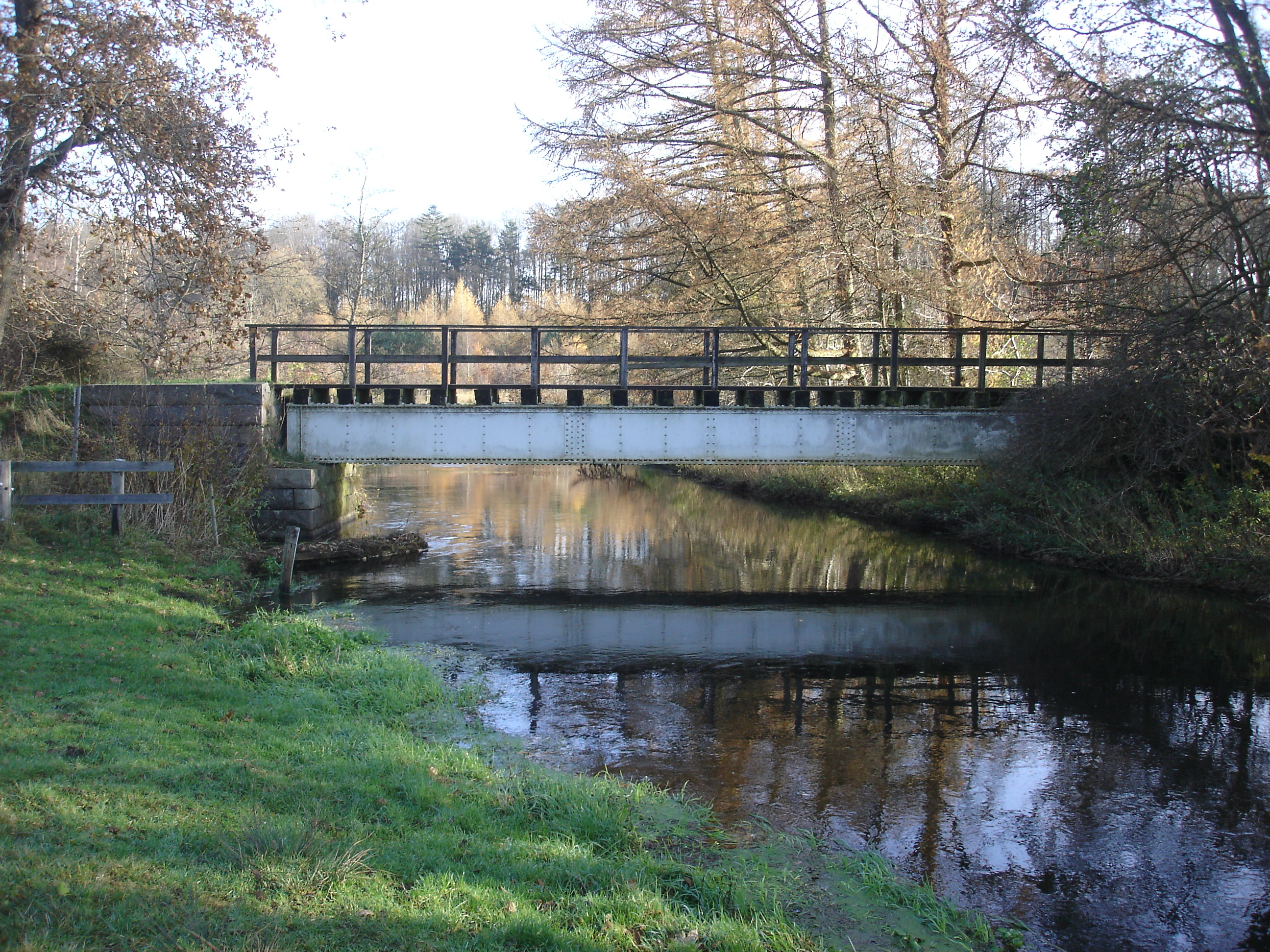 Bindeballestien krydser Vejle Å mellem Haraldskær Fabrik og Vingsted